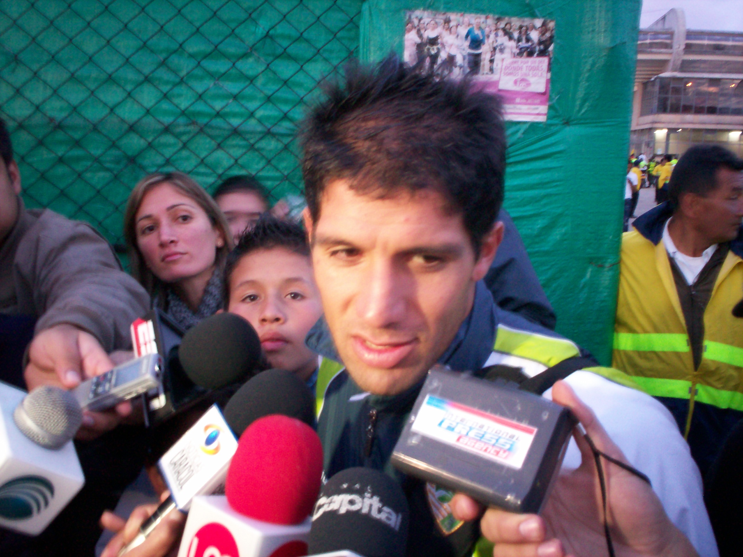 Futbolista argentino, Ariel Carreño.